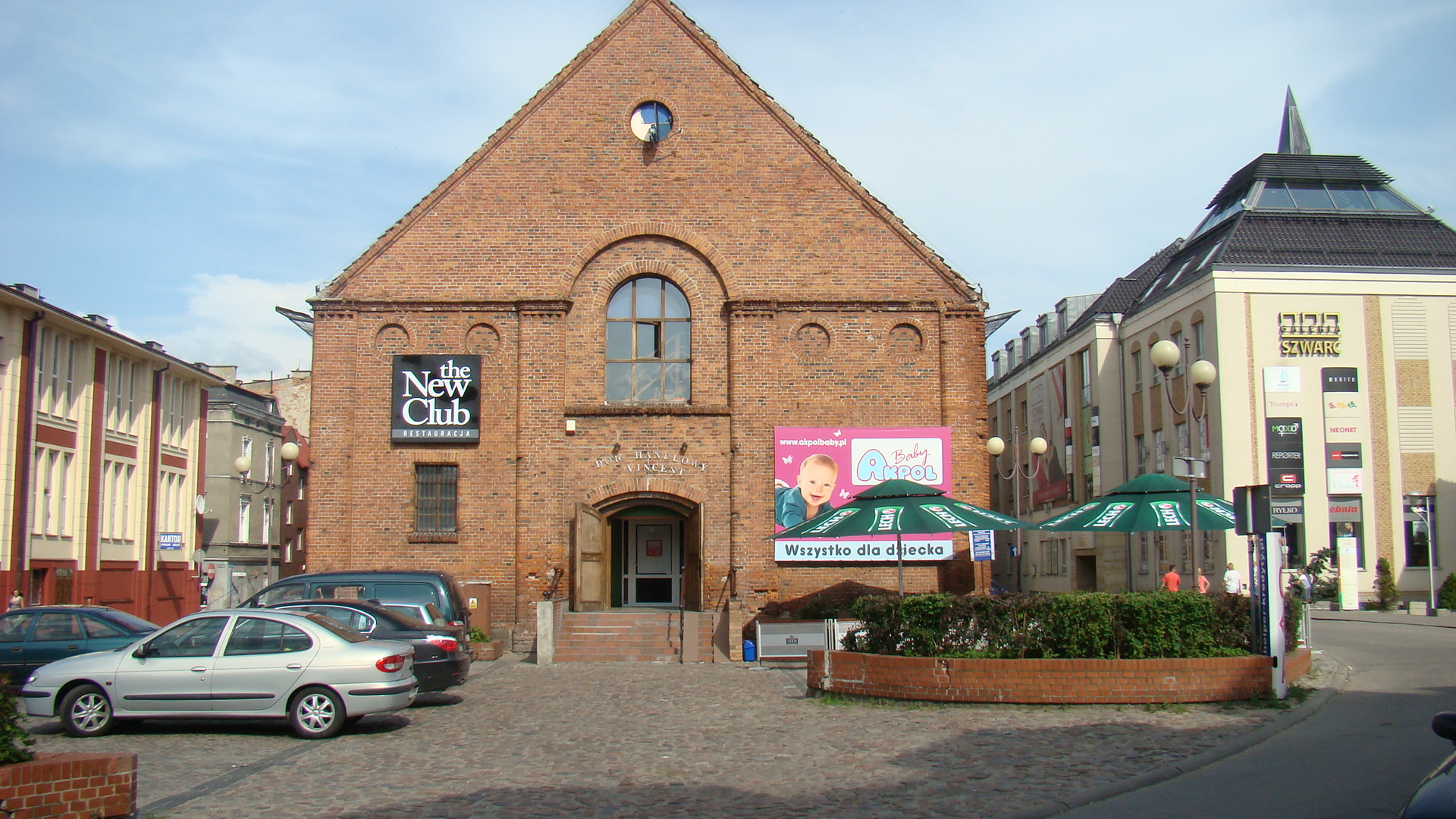 Dawna synagoga w Starogardzie Gdańskim.